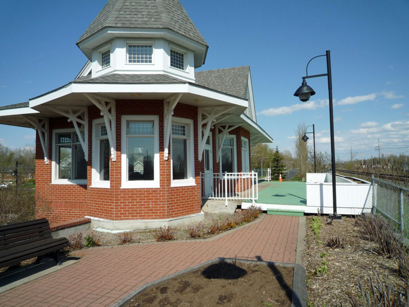 Gare du CN de Saint-Bruno-de-Montarville, restaurée en 1990.